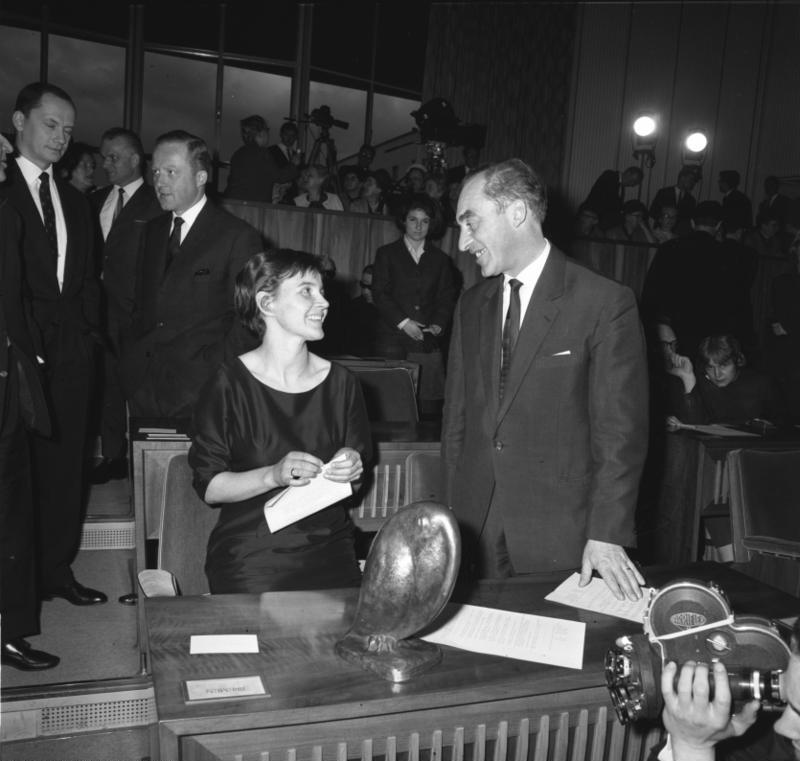 Verleihung des "Hörspielpreises der Kriegsblinden" an Frau Margarete Jehn, (Beckedorf bei Bremen), durch den Vorsitzenden des Bundes der Kriegsblinden Dr. Ludwig. Deutscher Bundesrat